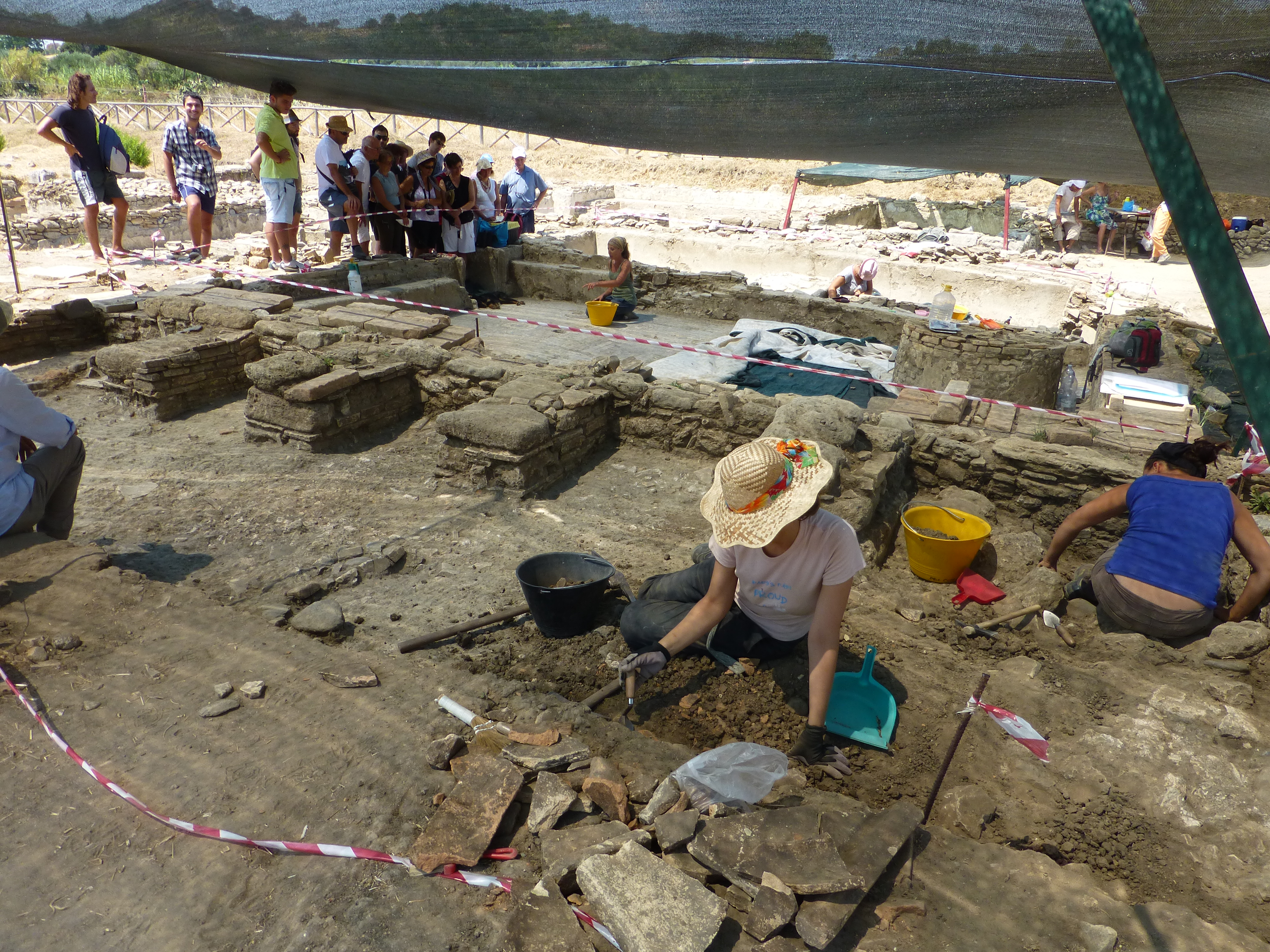 archeologi ad agosto nello scavo di kaulon - monasterace